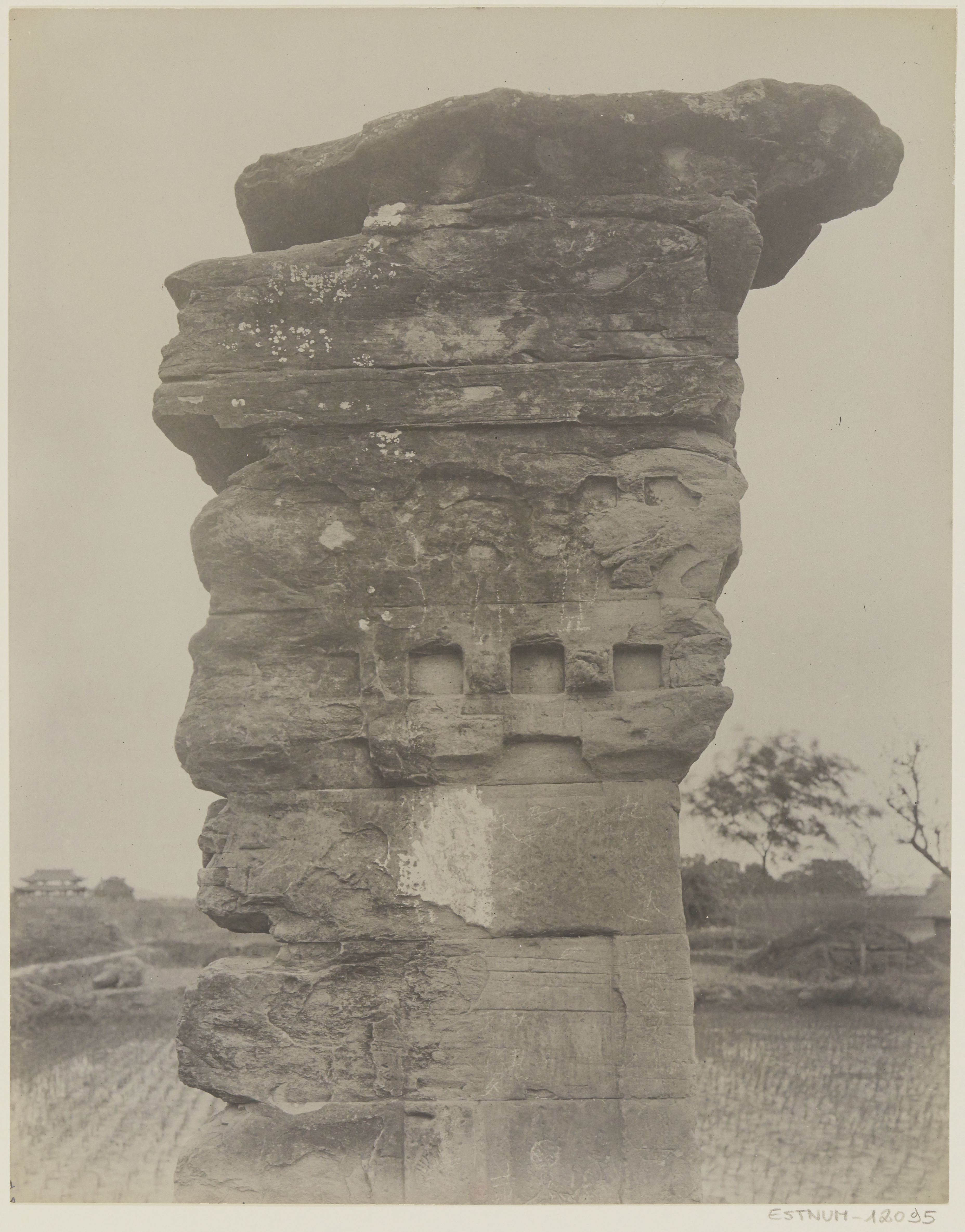 中文（台灣）: 梓潼漢代四闕